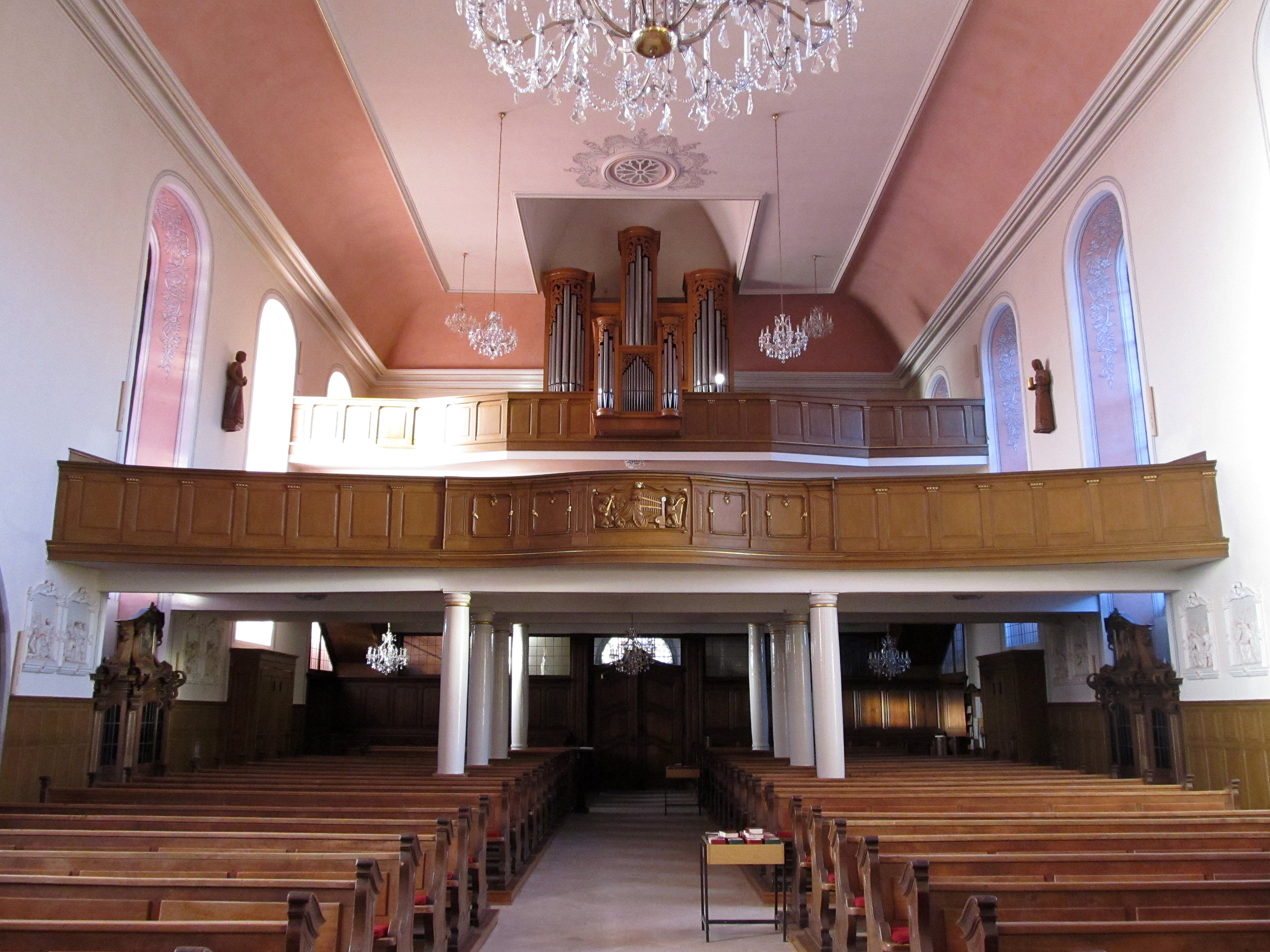 Blick ins Innere der katholischen Pfarrkirche St. Stephan in Illingen, Saarland